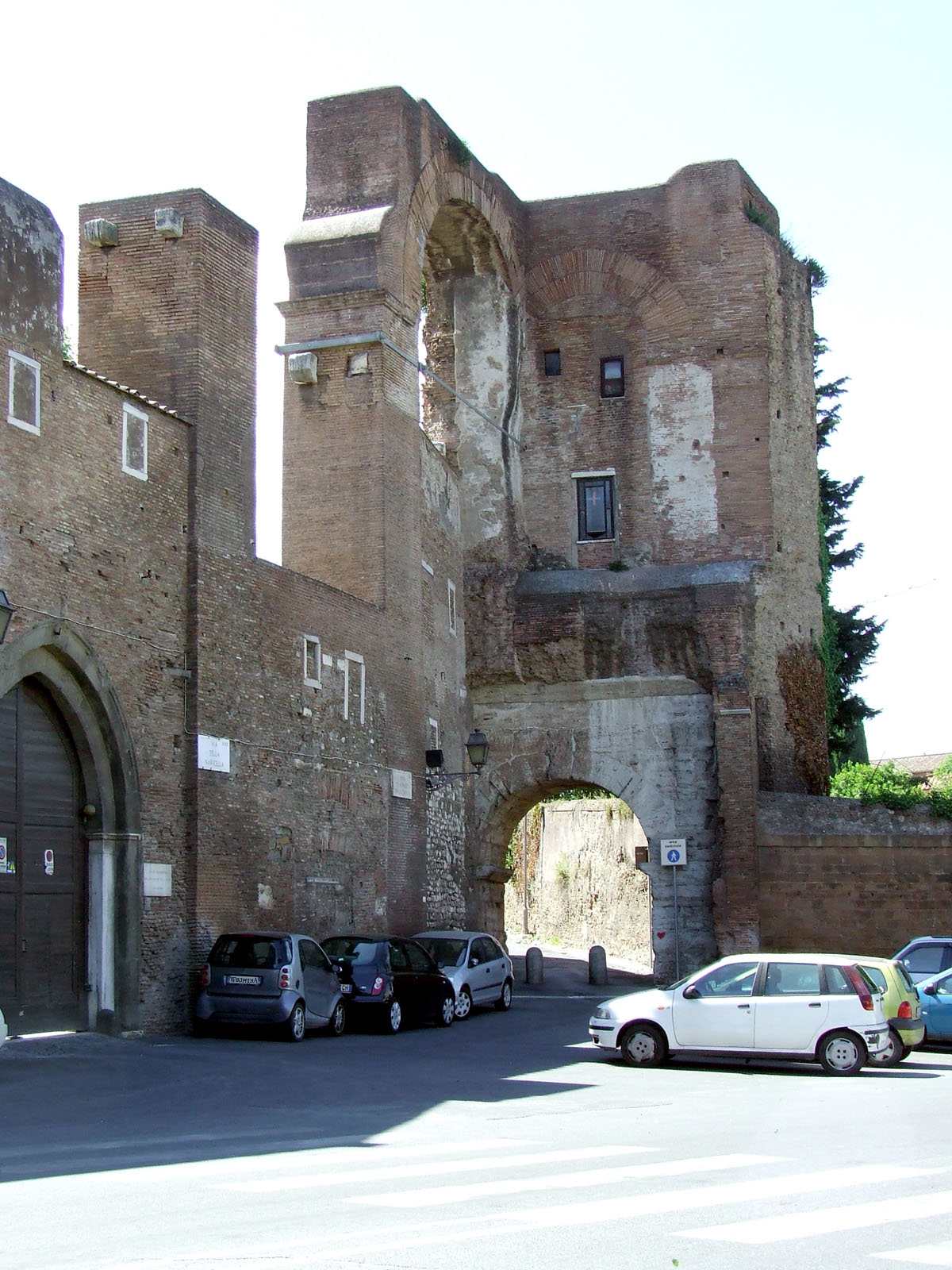 Roma, piazzale del Celio, Arco di Dolabella e Acquedotto Claudio